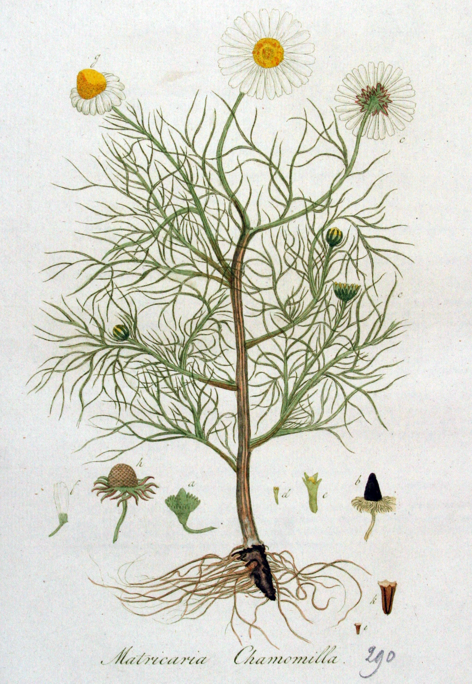 Matricaria recutita L. (Syn. Matricaria chamomilla L.)